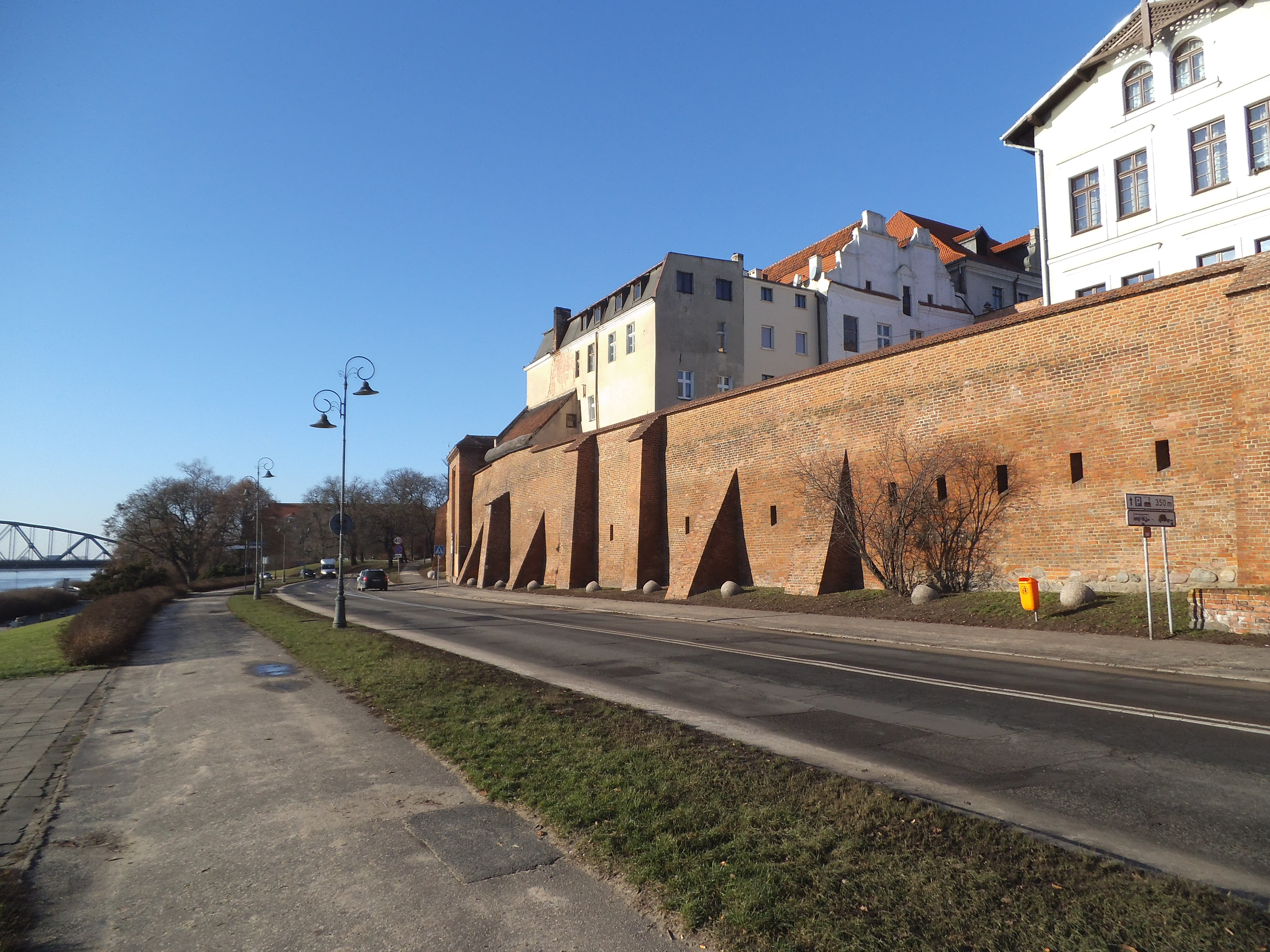 Mury miejskie Torunia